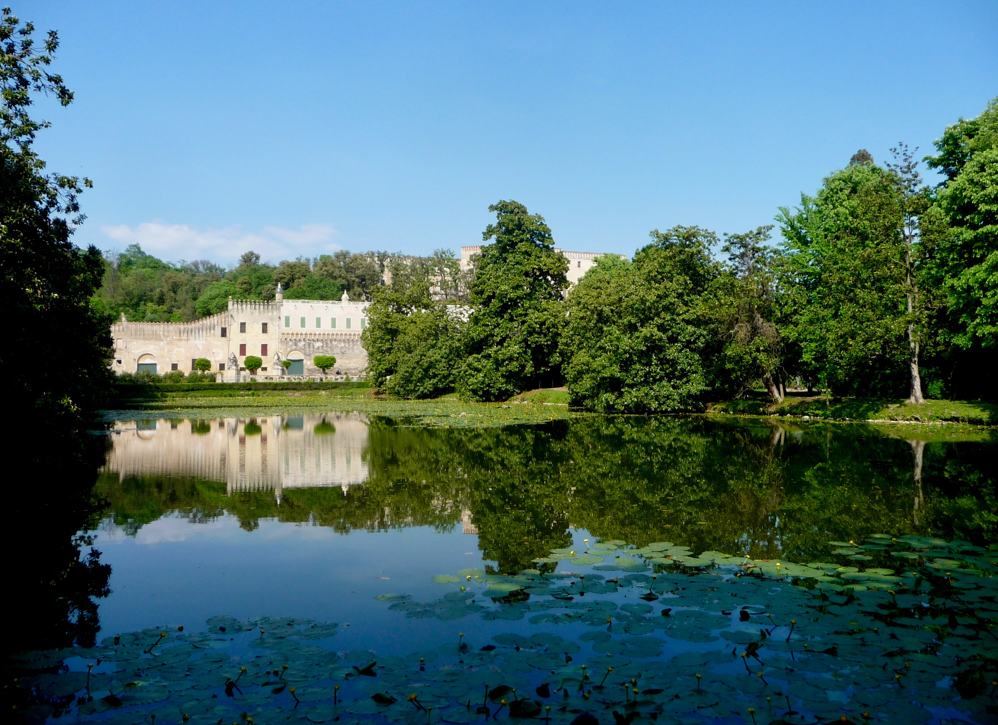 Castello del Catajo, Battaglia Terme (Padova).